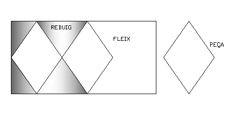 Corte:separación